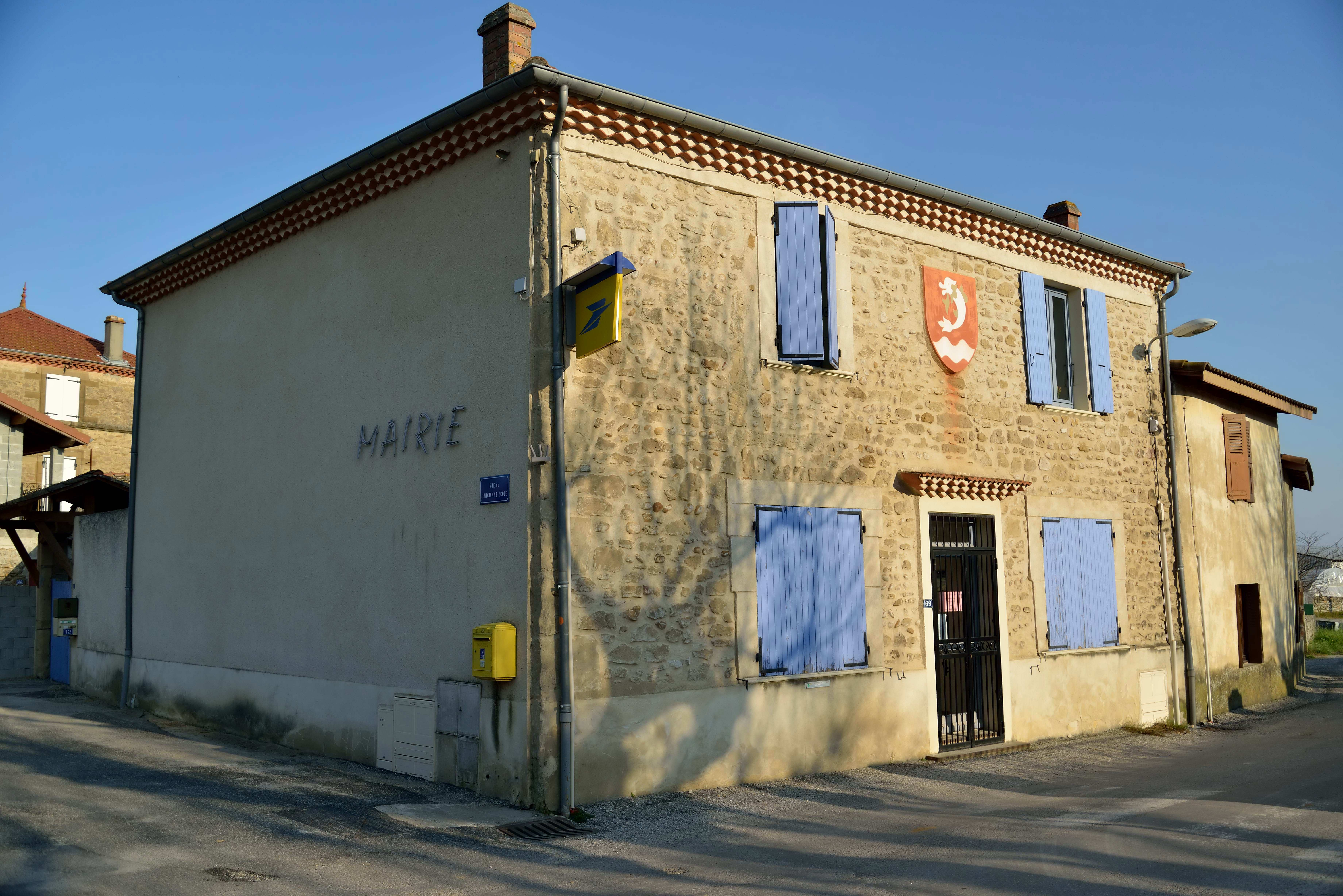 mairie